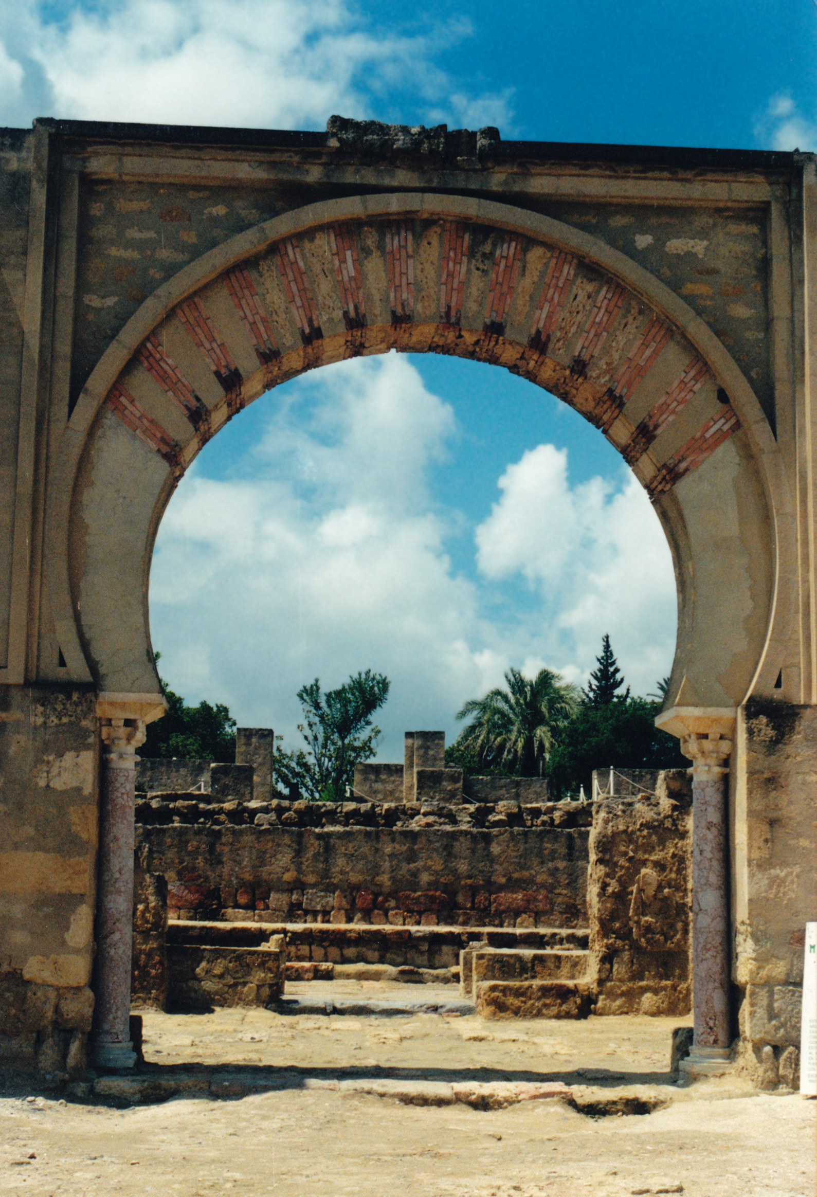 Espagne - Andalousie - Cordoue - Madinat al-Zahra - Bab al-Sudda